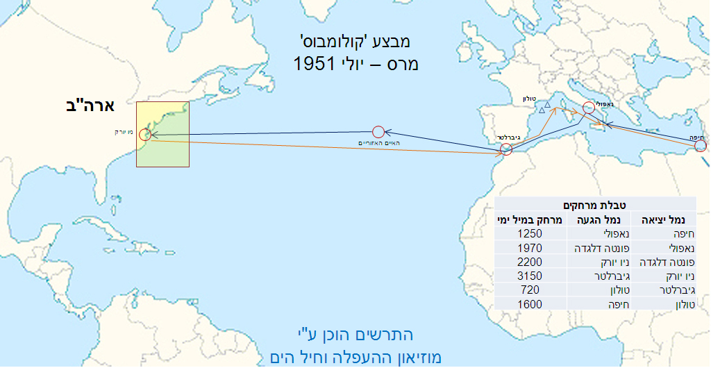 נתיב הפלגה מבצע קולומבוס 30 מרץ - 5 יולי 1951.